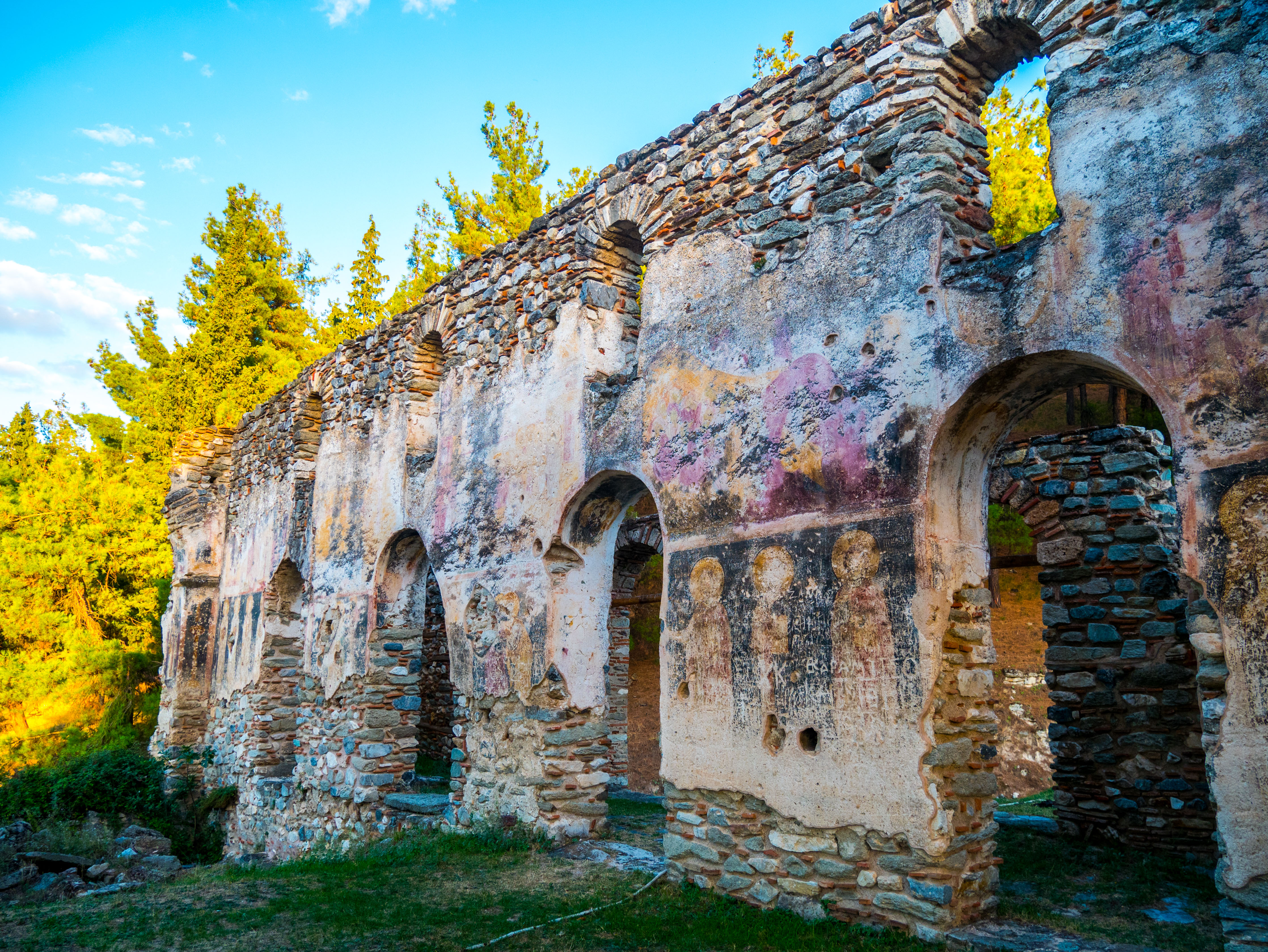 Βασιλική των Κατηχουμένων Σερβίων«Βασιλική των Κατηχουμένων Σερβίων»